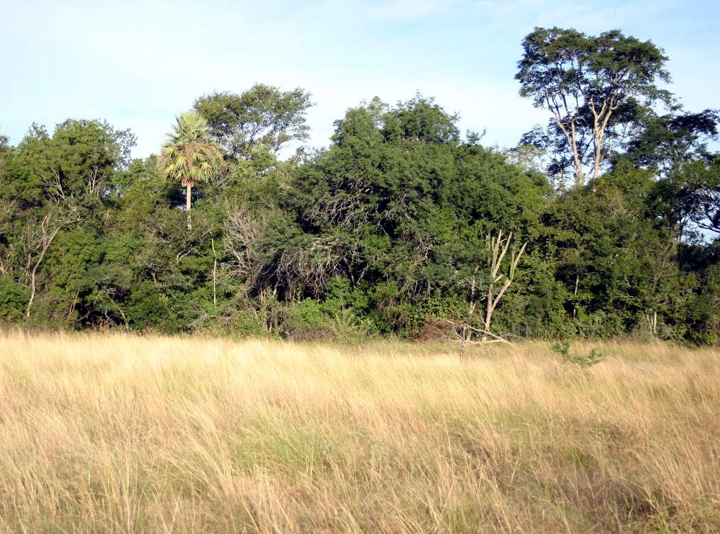 En Chaco, abra o pampa es un espacio cubierto por pastizales rodeados o encerrado por bosques